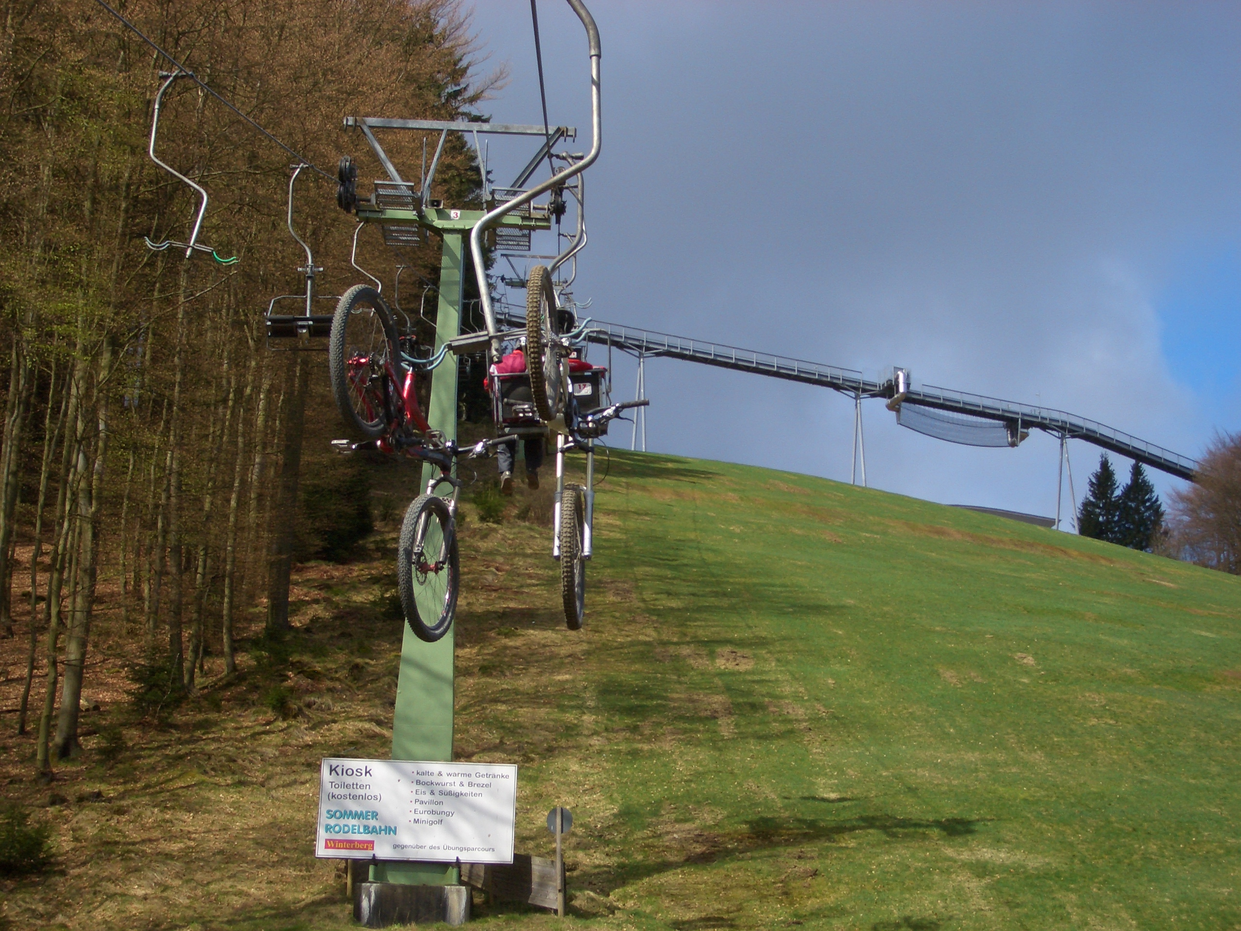 Sessellift mit Aufhängevorrichtung für Fahrräder im Bikepark Winterberg